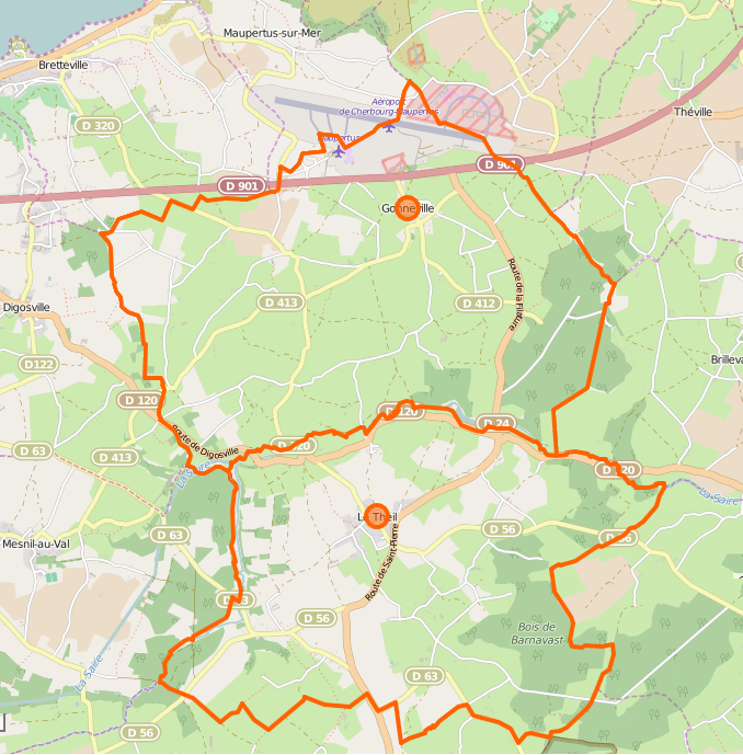 Carte de Gonneville-Le Theil, commune nouvelle